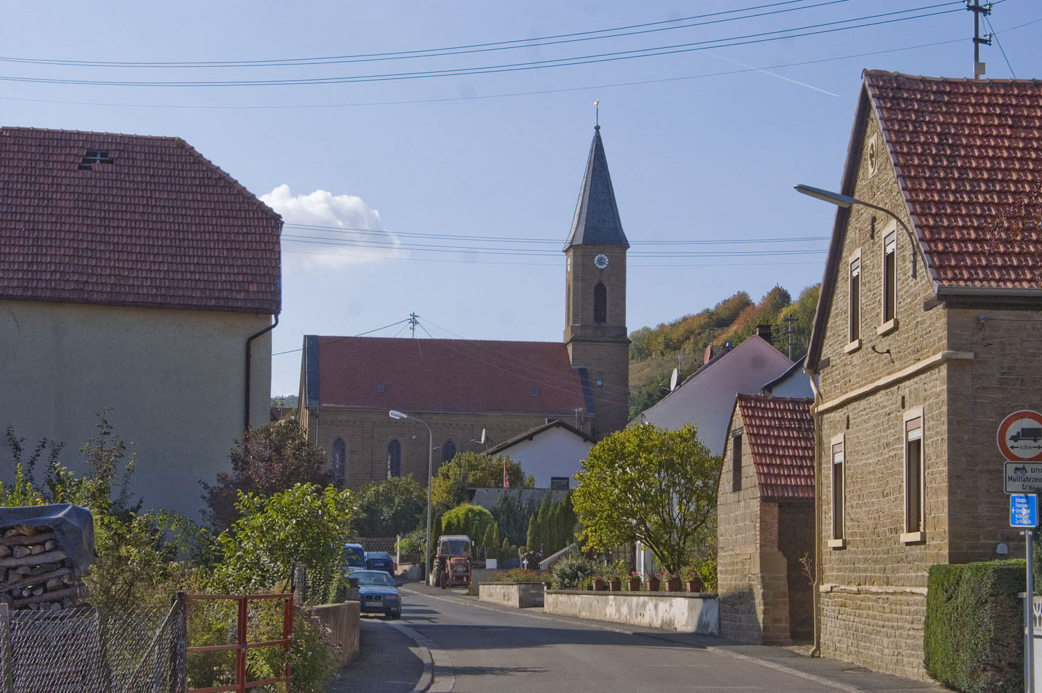 Hauptstraße 18: Protestantische Kirche; neugotischer Sandsteinquader-Saalbau, 1861–63, Architekt Bezirksbauschaffner Hepp, Alsenz, Turmerneuerung 1938; Walcker-Orgel von 1907; ortsbildprägend